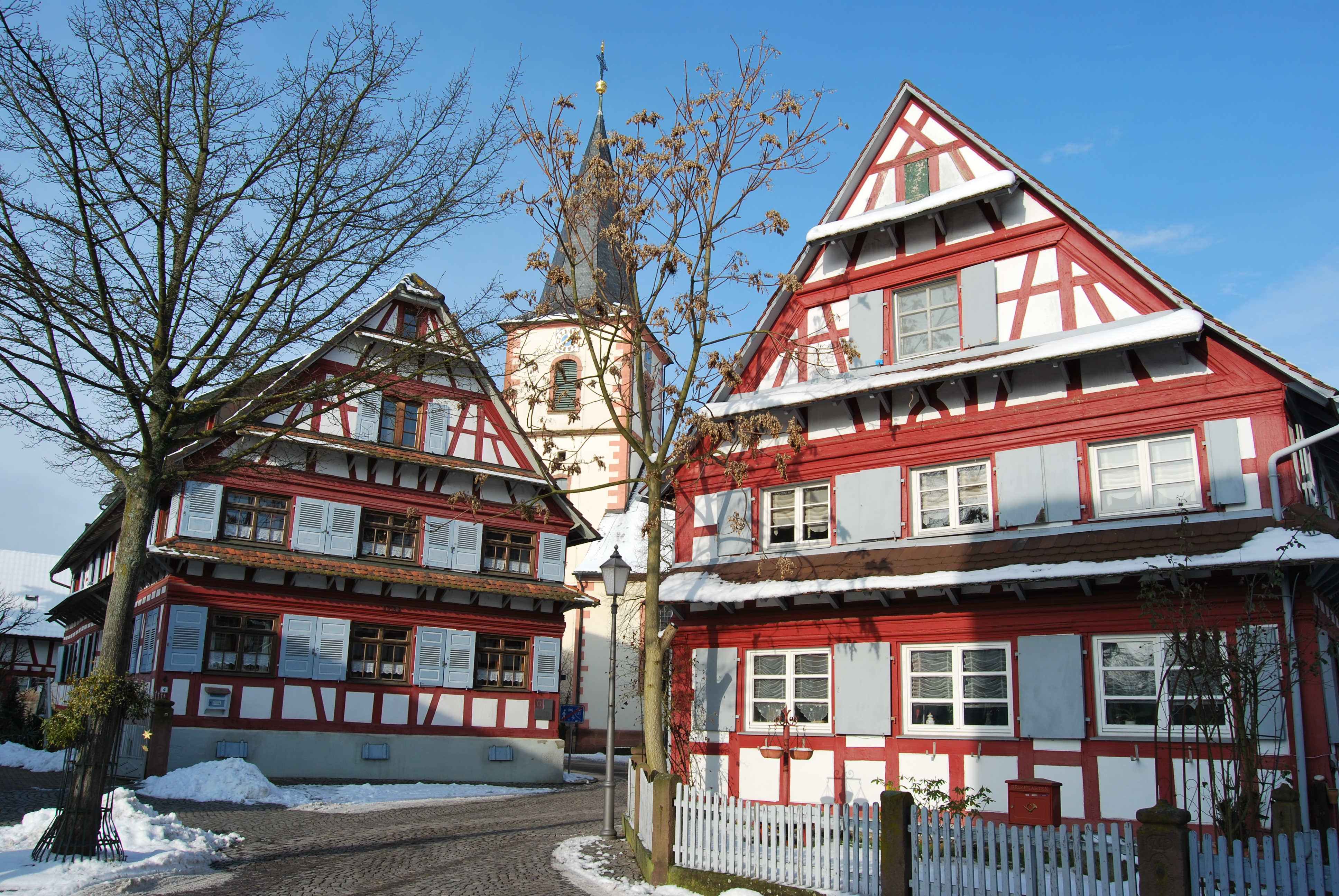 Häuser in Kork